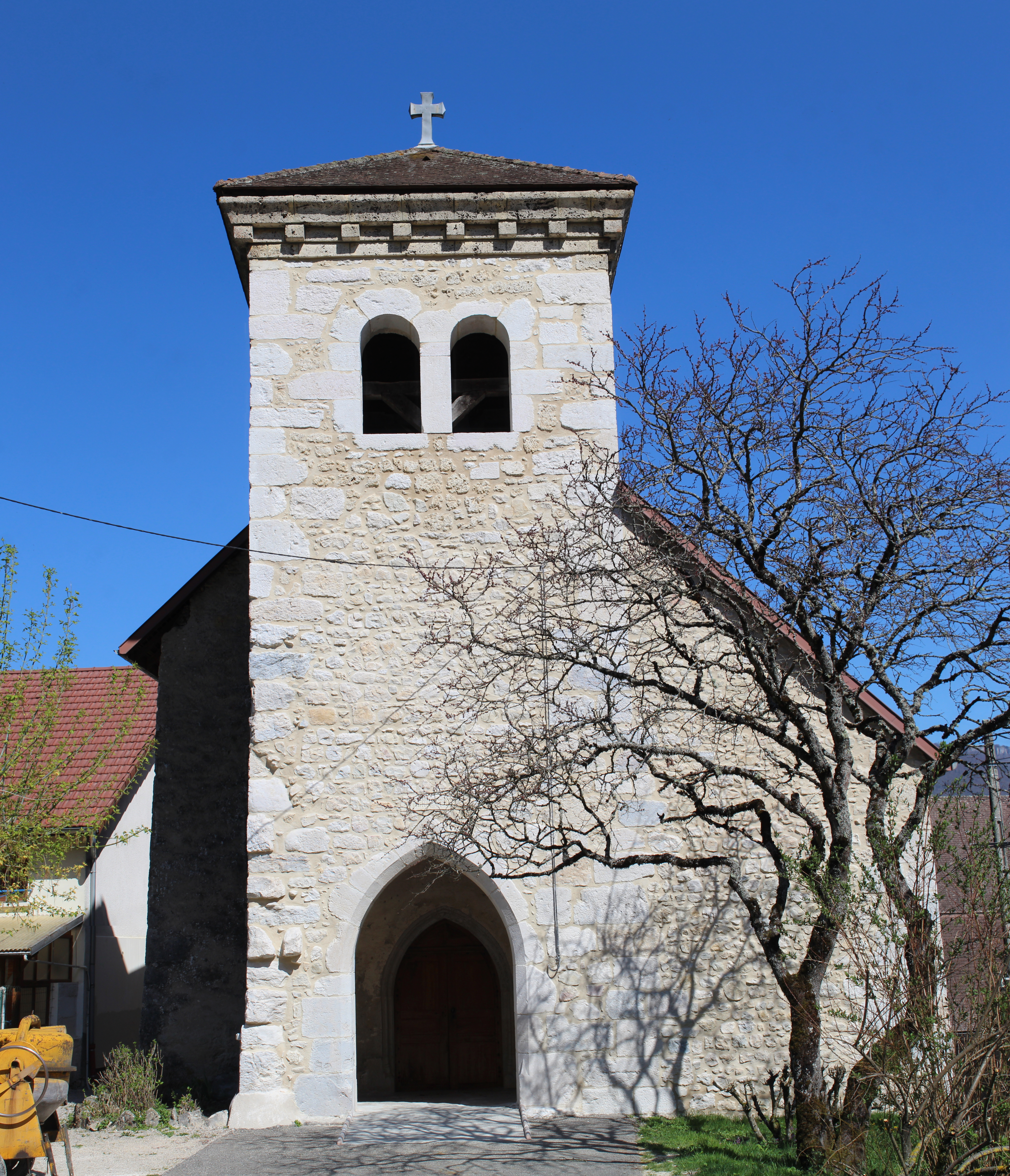 Église Saint-Oyen de Belmont, Belmont-Luthézieu.